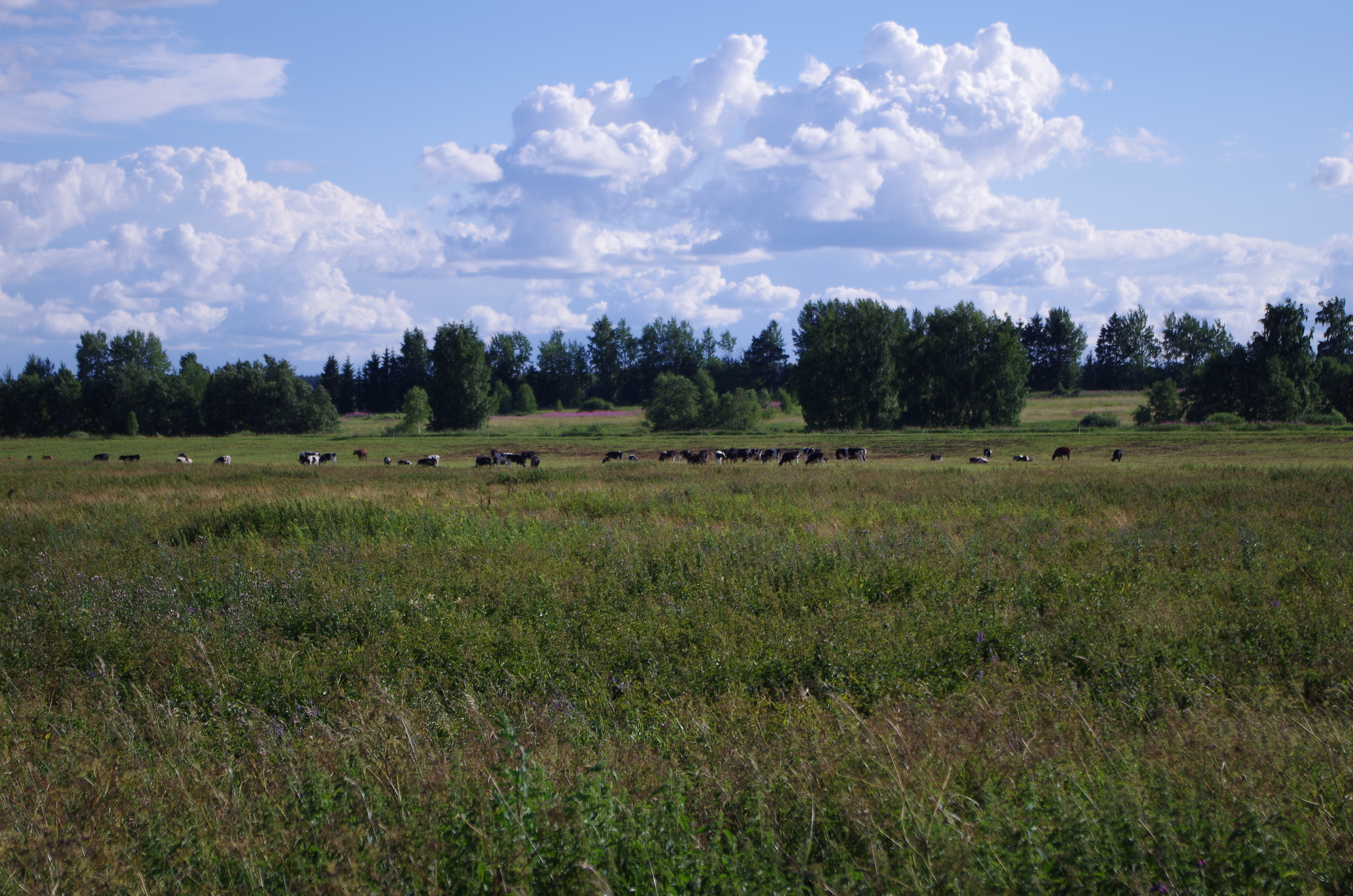 Veised Aardla poldril